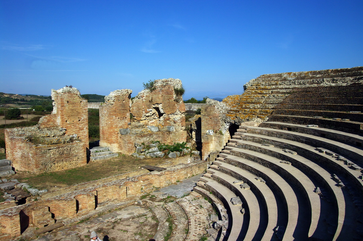 Nikopolis, Odeon, Innenansicht